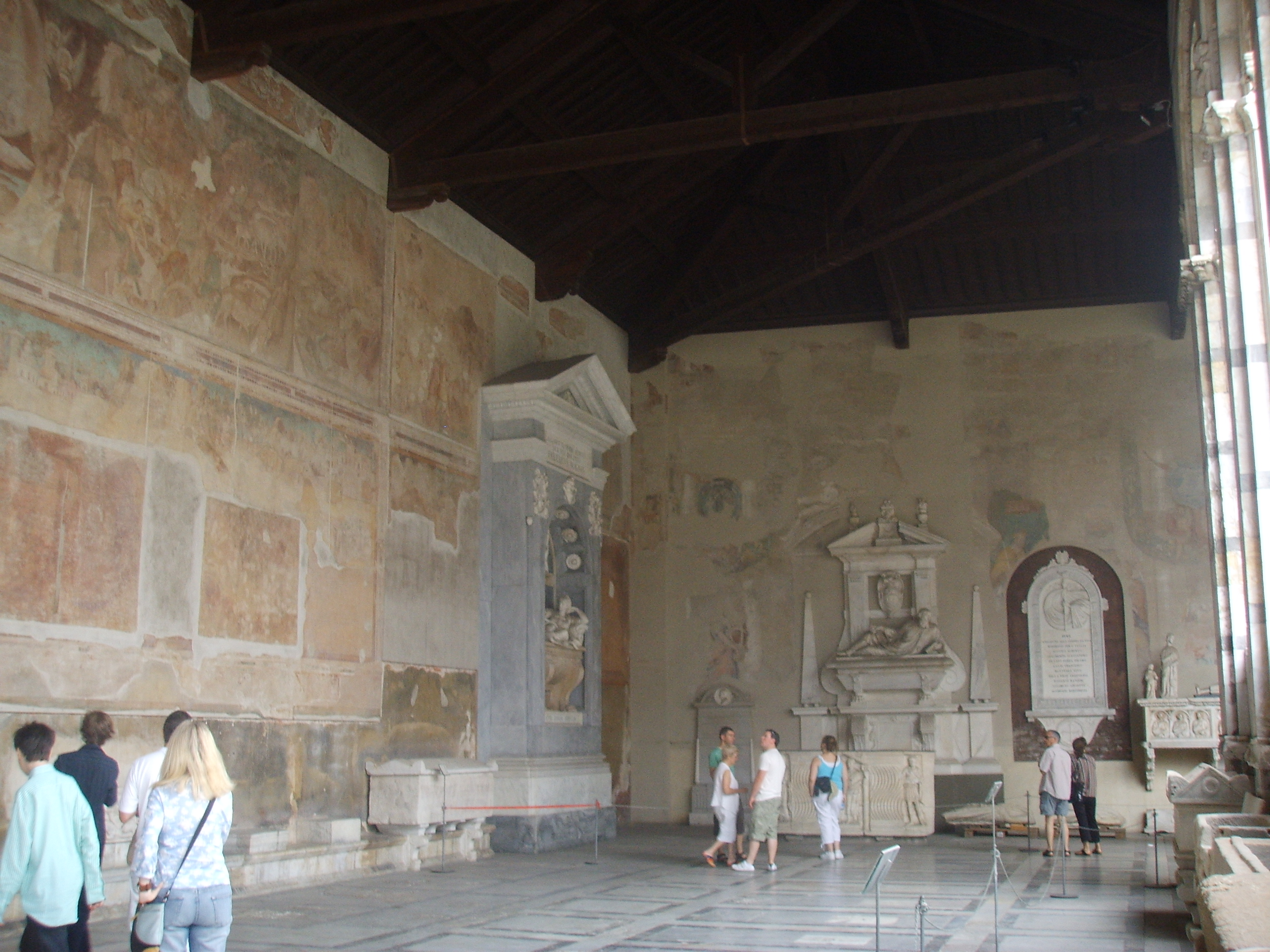 Monumental Camposanto (graveyard) inside view in Pisa, Italy